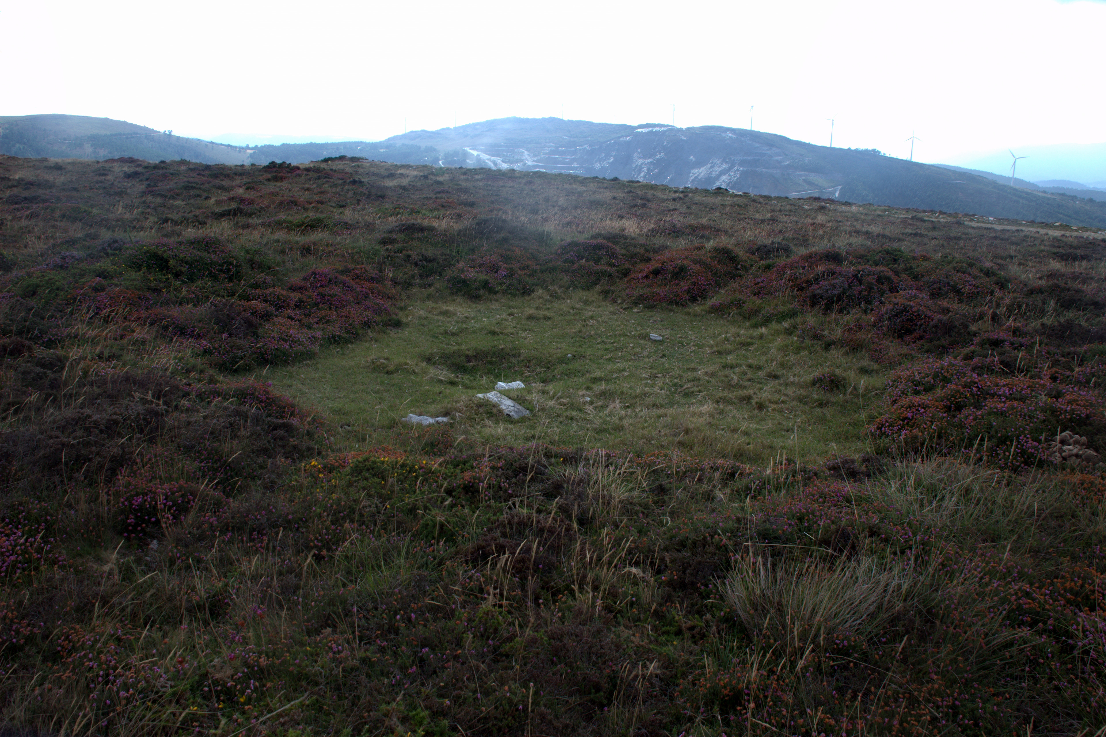 "escavación circular de nueve metros de diámetro y fondo plano, de unos 60 cm de profundidad, casi constantemente llena de agua pluvial ... repitiéndose el caso del túmulo 75, y habiendo observado el propio fenómeno en otra necrópolis de la comarca ... en Seixas (Somoza) teniendo en cuenta los lugares cimeros en los que aparecen, donde no hay arrastres ni movimientos de tierra y es pobre la vegetación para que el humus las rellene, puede explicarse que a través de centurias se hubiesen llegado a conservar nada justifica que los vecinos de los distantes caseríos precisasen haber practicado esos amplios hoyos rigurosamente circulares en puntos diversos y en tales descampados e incultas alturas, siempre coincidentes con necrópolis prehistóricas" Federico Maciñeira